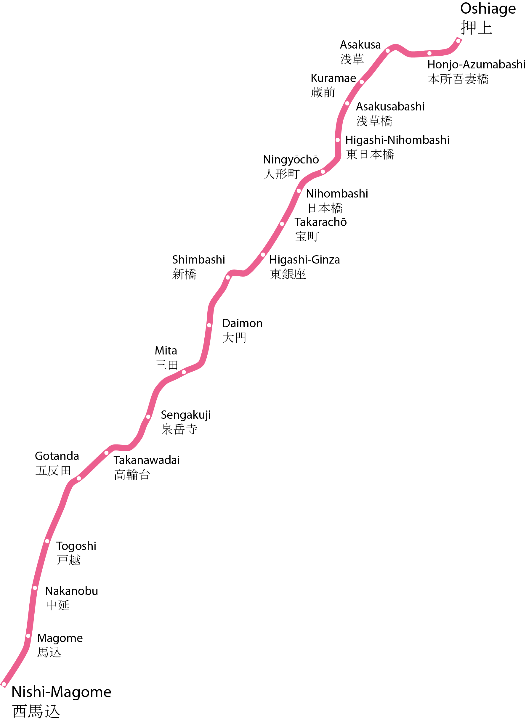 Mapa geogràfic aproximat de la Asakusa Line.